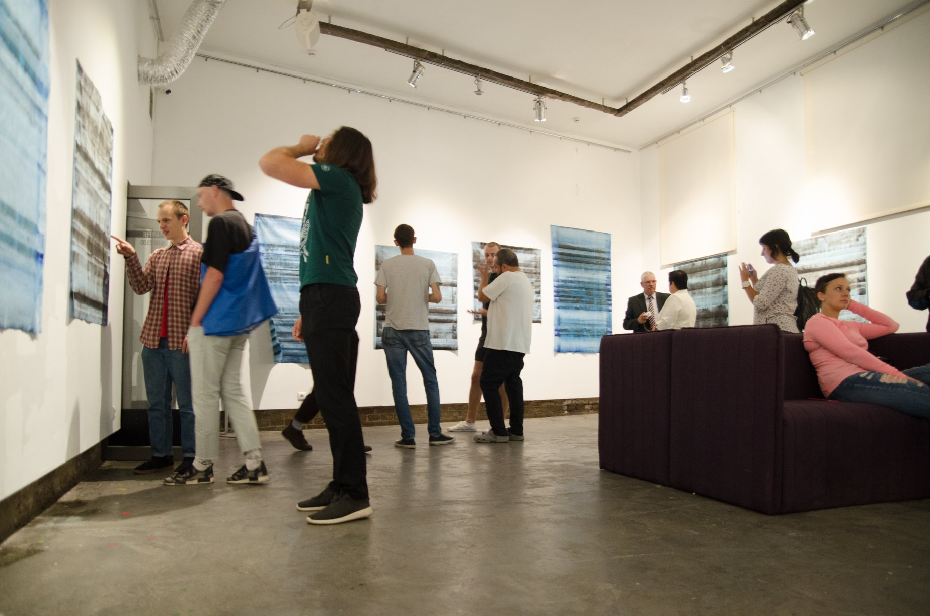 Відкриття однієї із виставок в галереї Бункермуз у Тернополі